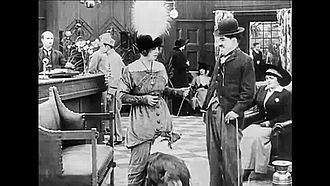 The tramp trong lần xuất hiện đầu tiên trước công chúng